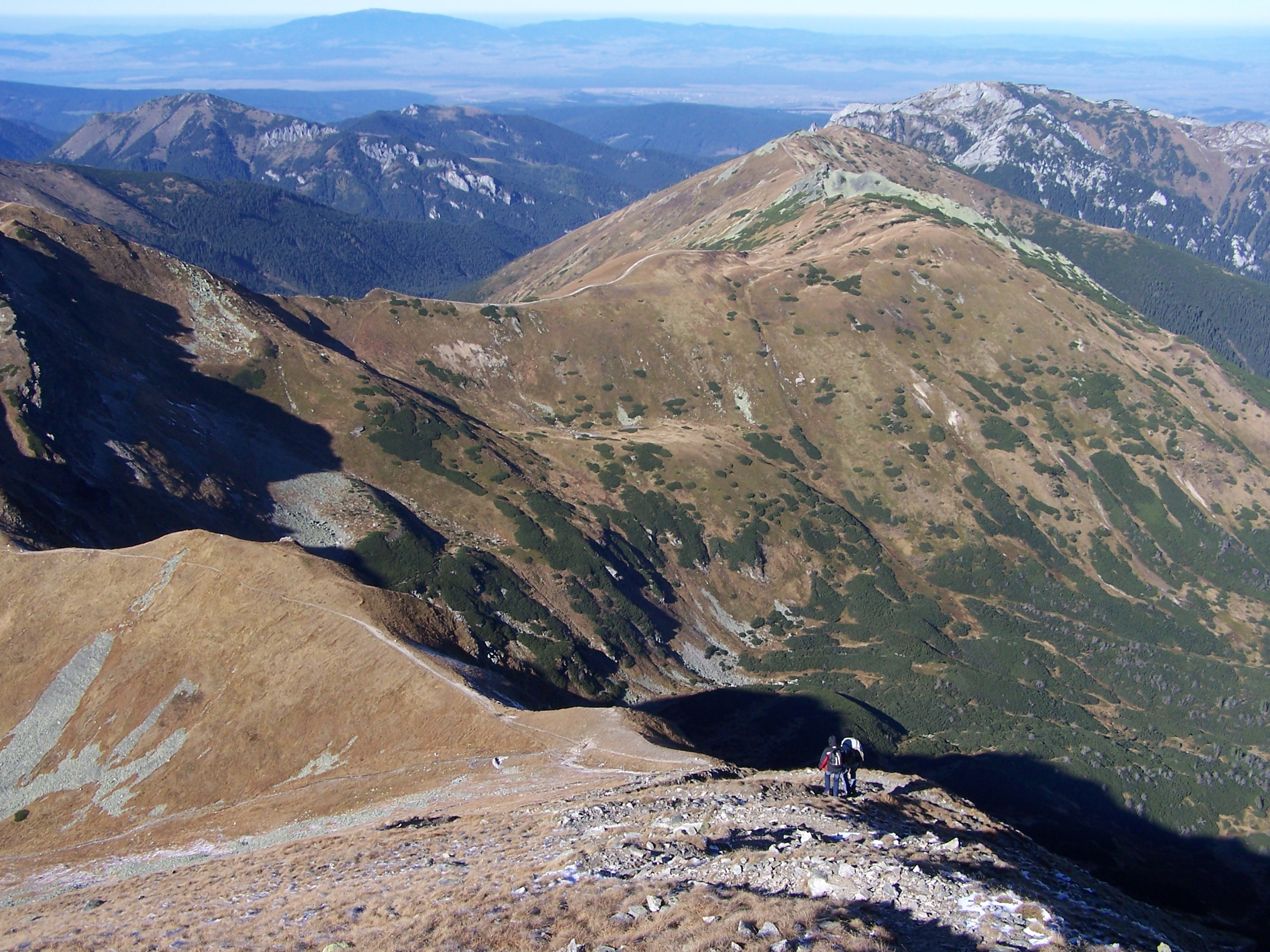 Widok z Błyszcza. W dole Ornak, dalej po lewej Bobrowiec, po prawej Kominiarski Wierch